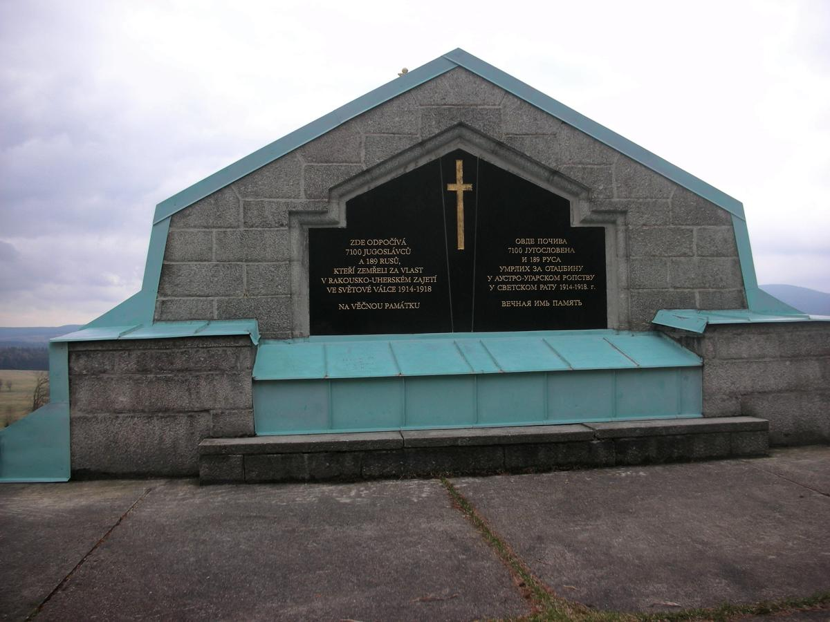 Inschrift am Mausoleum in Jindřichovice